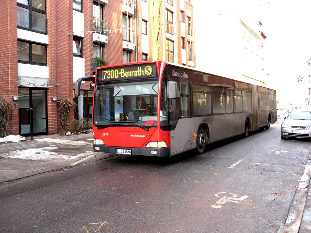 Buslinie 730 in Benrath, Benrather Marktplatz ru: Авторбусный маршрут 730. Остановка "Бенратер Марктплатц".